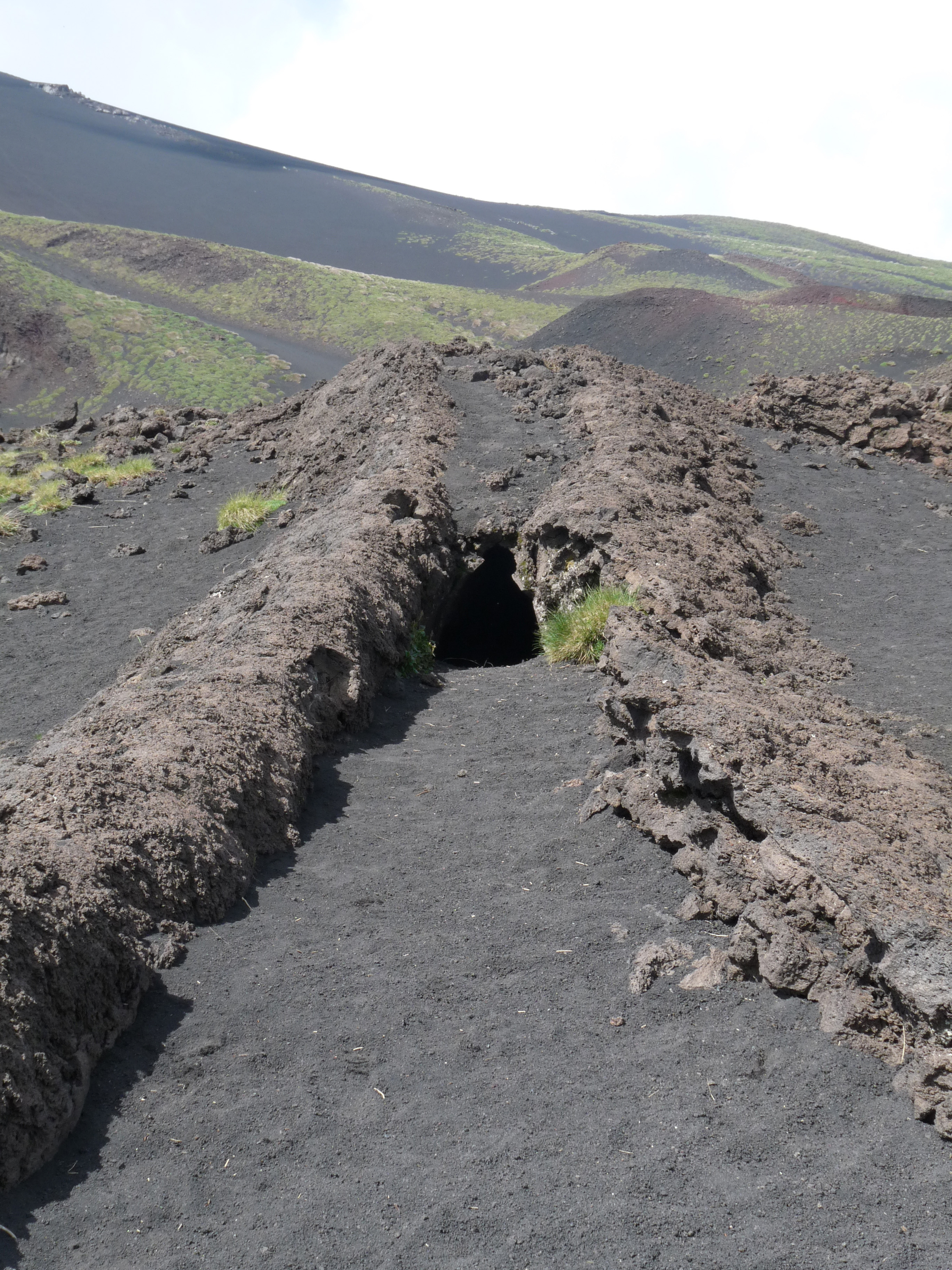 Petite grotte de lave sur le versant Sud de l'Etna (Sicile)